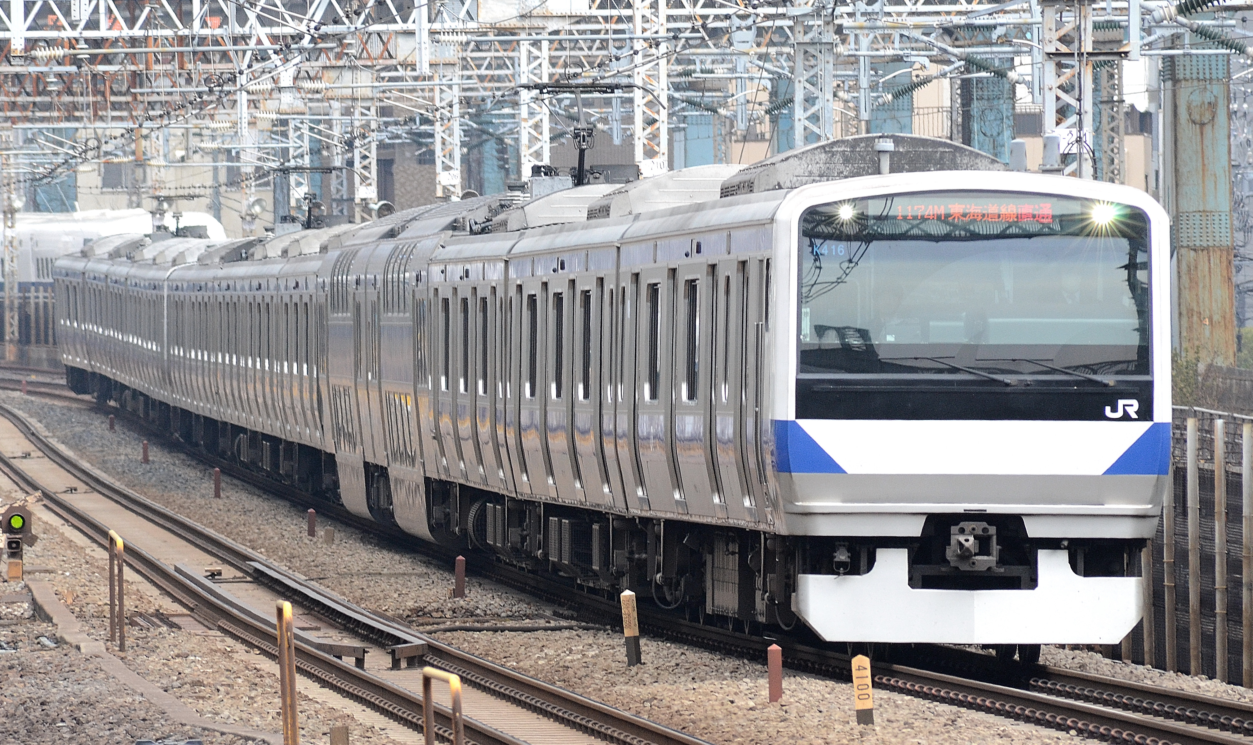 東海道本線、新橋-品川間を走行する常磐線からの直通の｢上野東京ライン」のE531系（田町駅ホームから撮影）